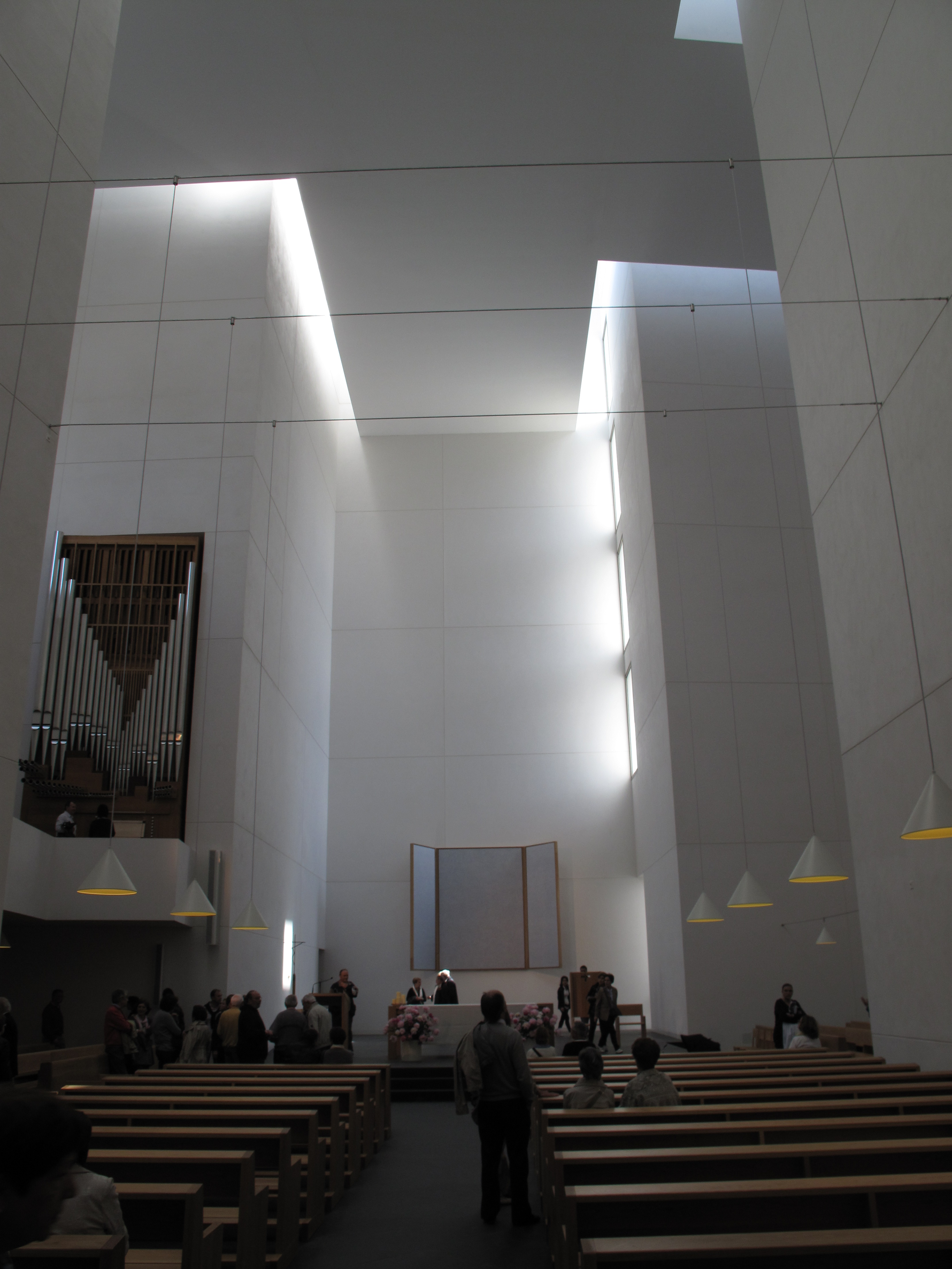 Iglesia de Iesu en Donostia. Obra de Rafael Moneo en 2011.